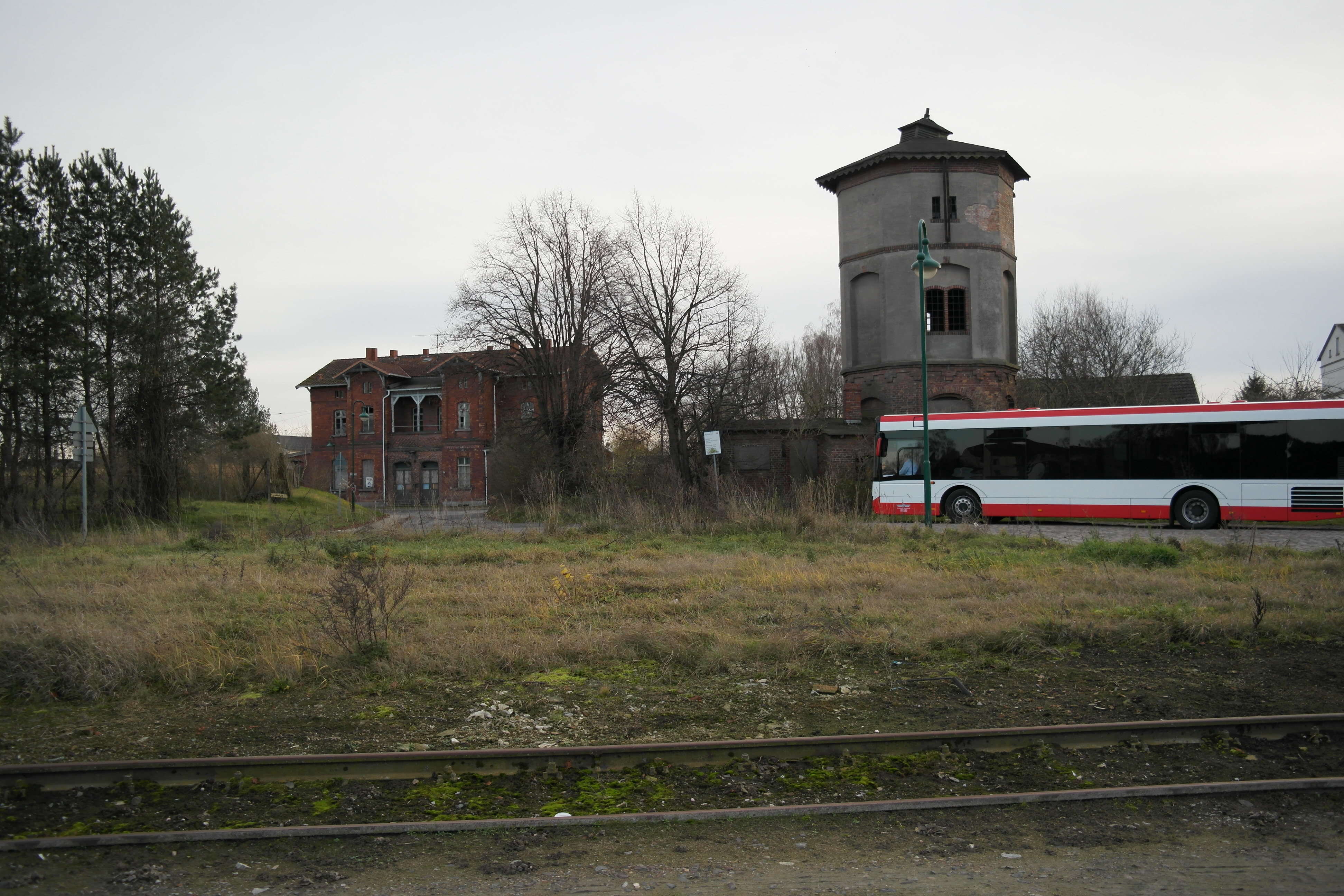 Bahnhof Lalendorf, Blick vom Lloydbahnteil zum Gebäude der Strecke aus Güstrow mit Wasserturm